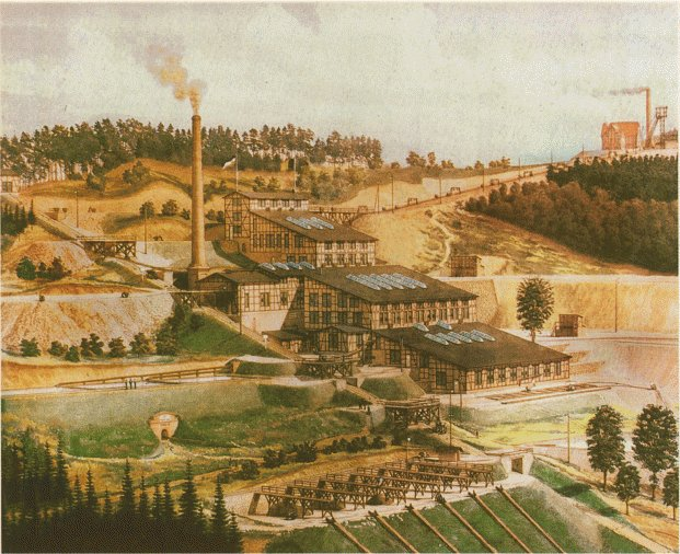 Erzaufbereitung am Lüderich, Ölgemälde